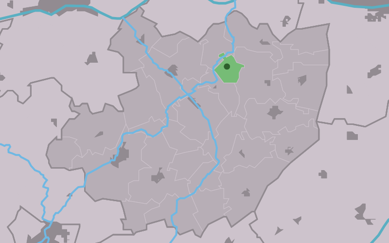 Kaartsje fan himrik fan Leons